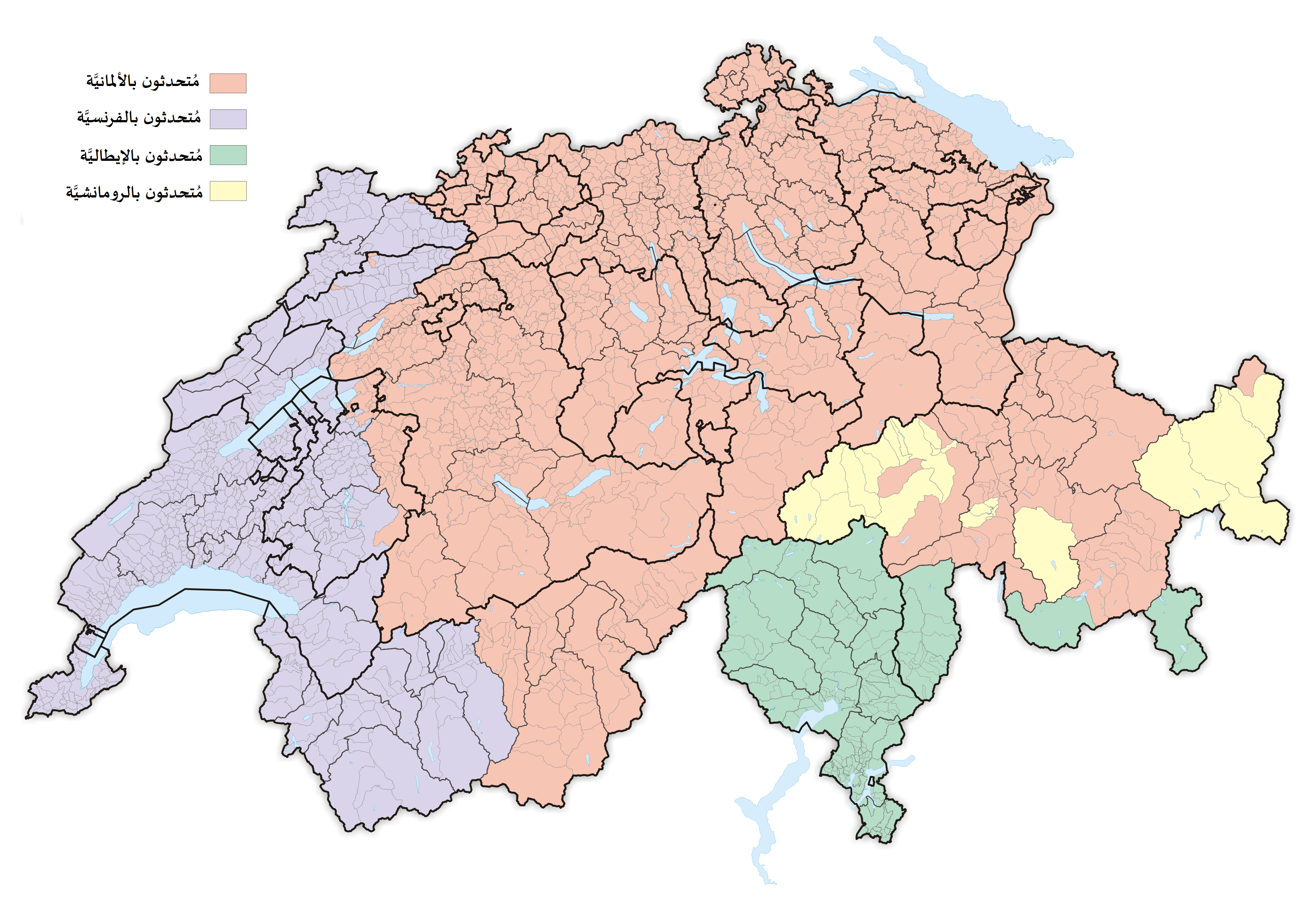 خارطة تُبيّن توزُّع اللُغات في سويسرا.